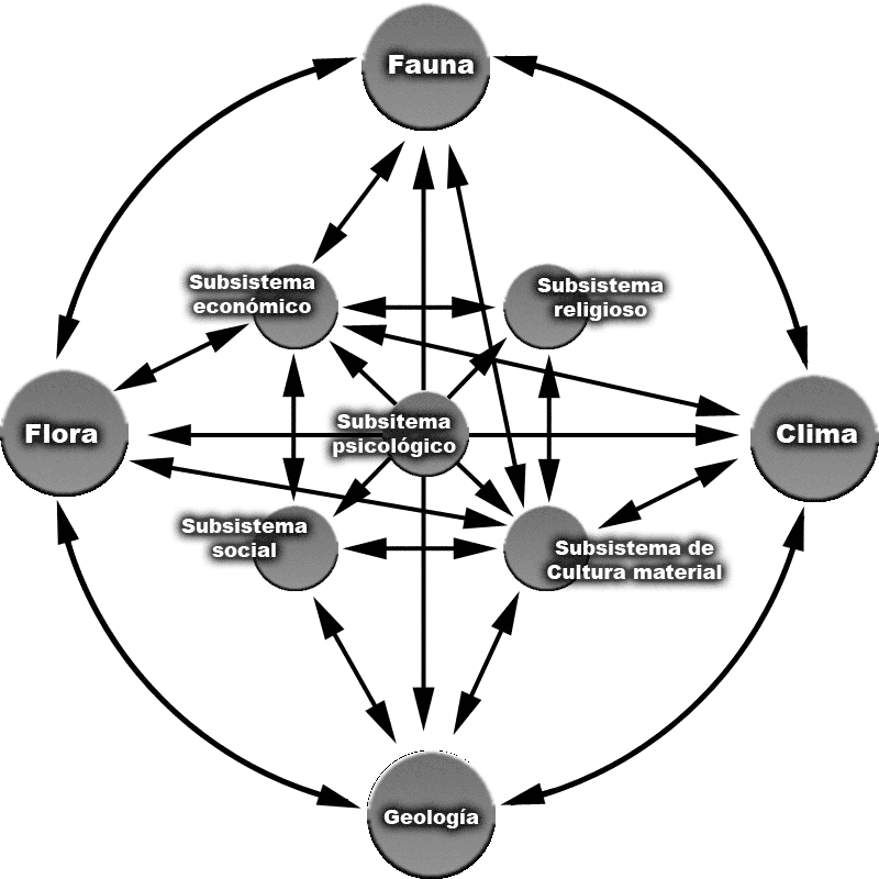 Arqueología procesual: David L. Clarke. Ejemplo de equilibrio dinámico entre las redes del subsistema sociocultural único y su sistema ambiental total